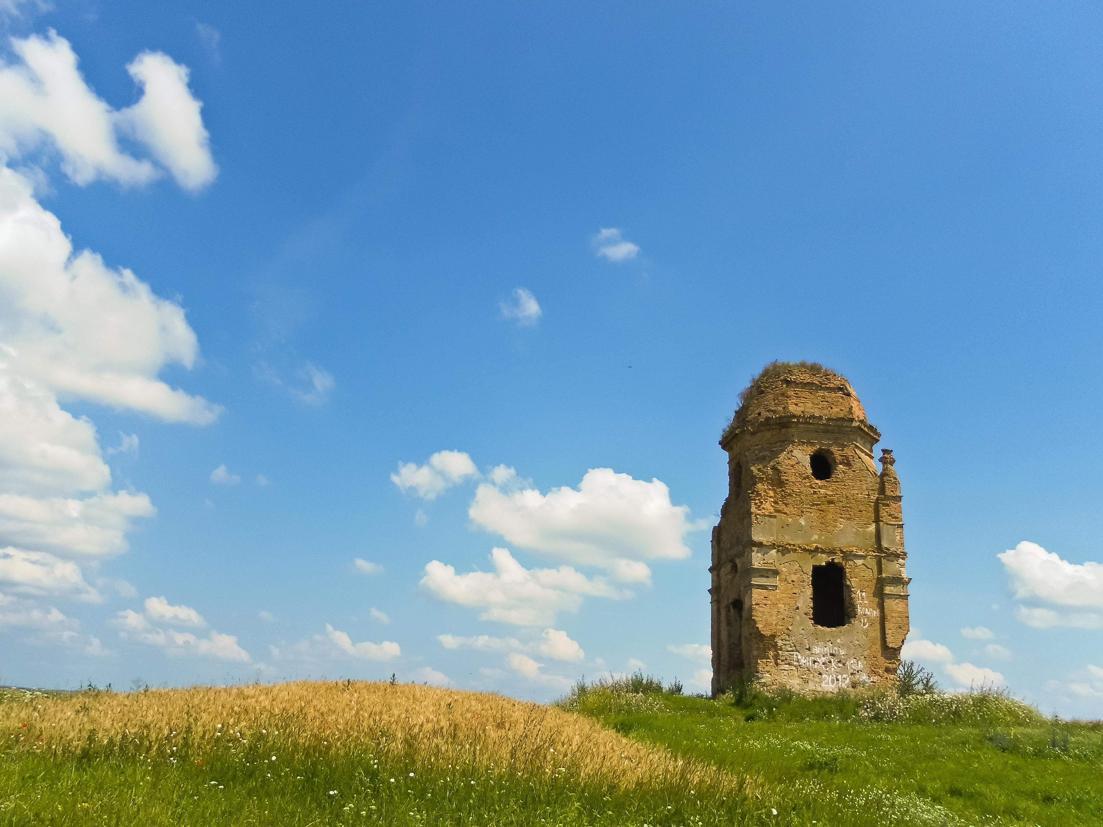 Вежа-каплиця аріанська (соцініанська), село Тихомель